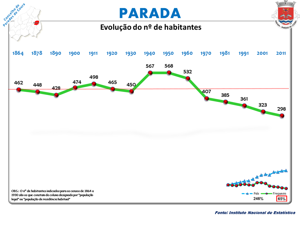 Censos 1864/2011